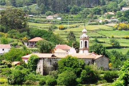 Mosteiro de Miranda Arcos de Valdevez